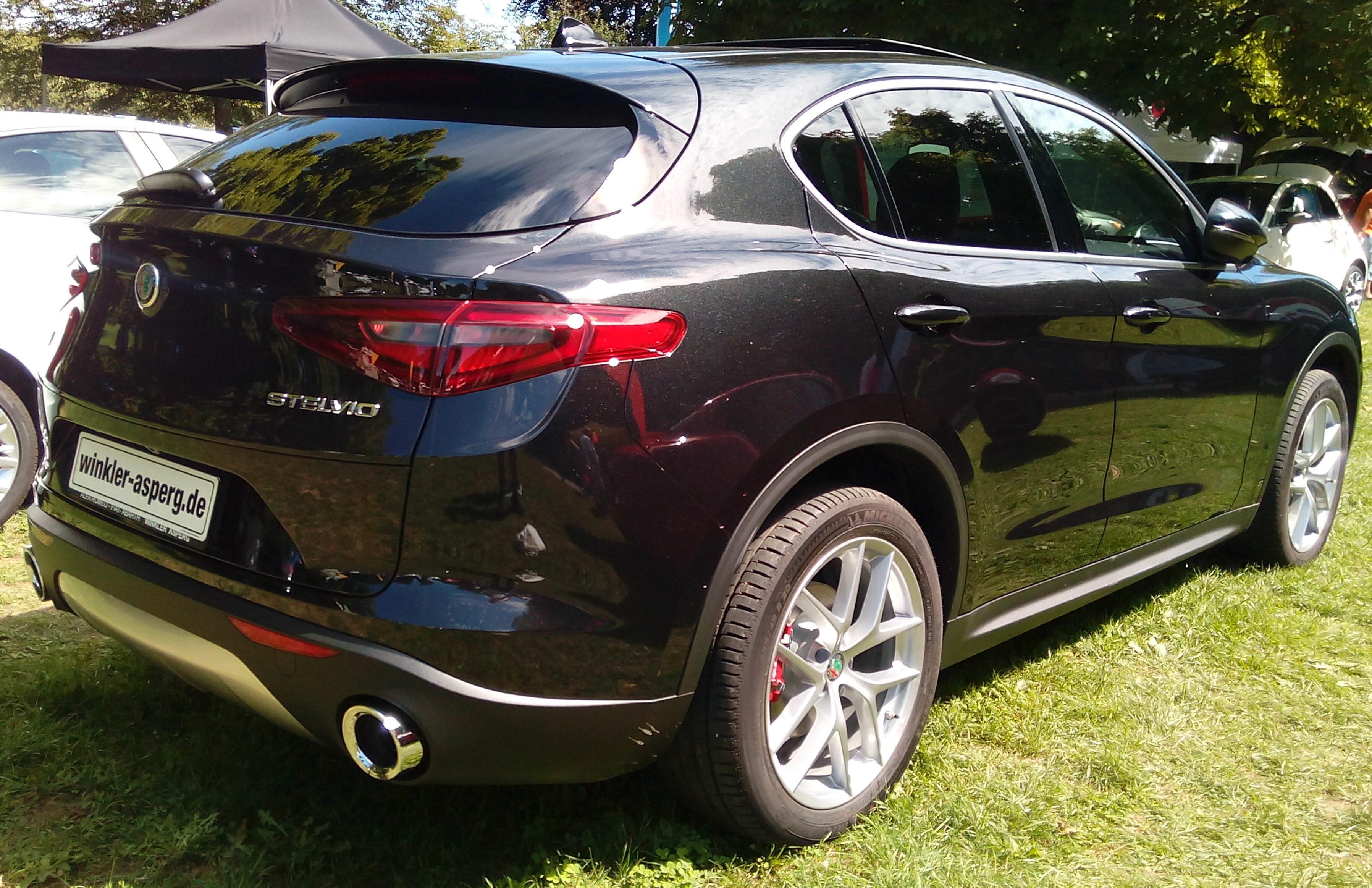 Alfa Romeo Stelvio auf der Automesse Monrepos